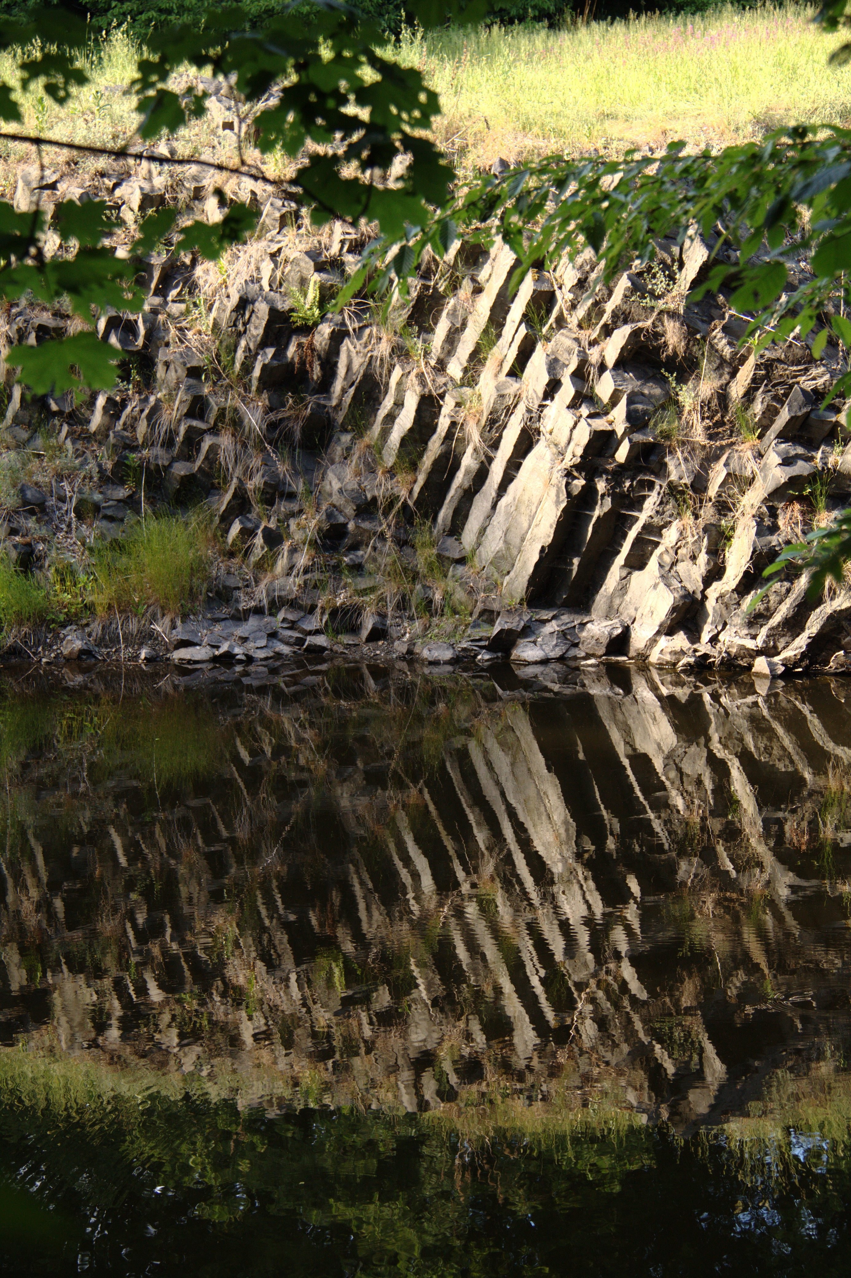 Impressionen Wachtberg (Taubenheim)